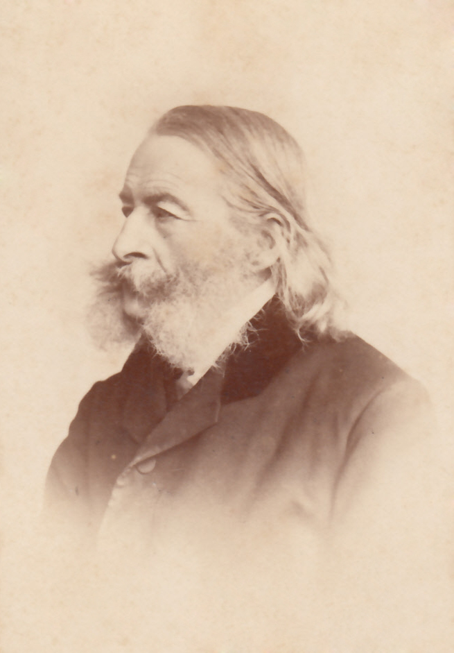 Carl Rechlin (1802 - 1875)